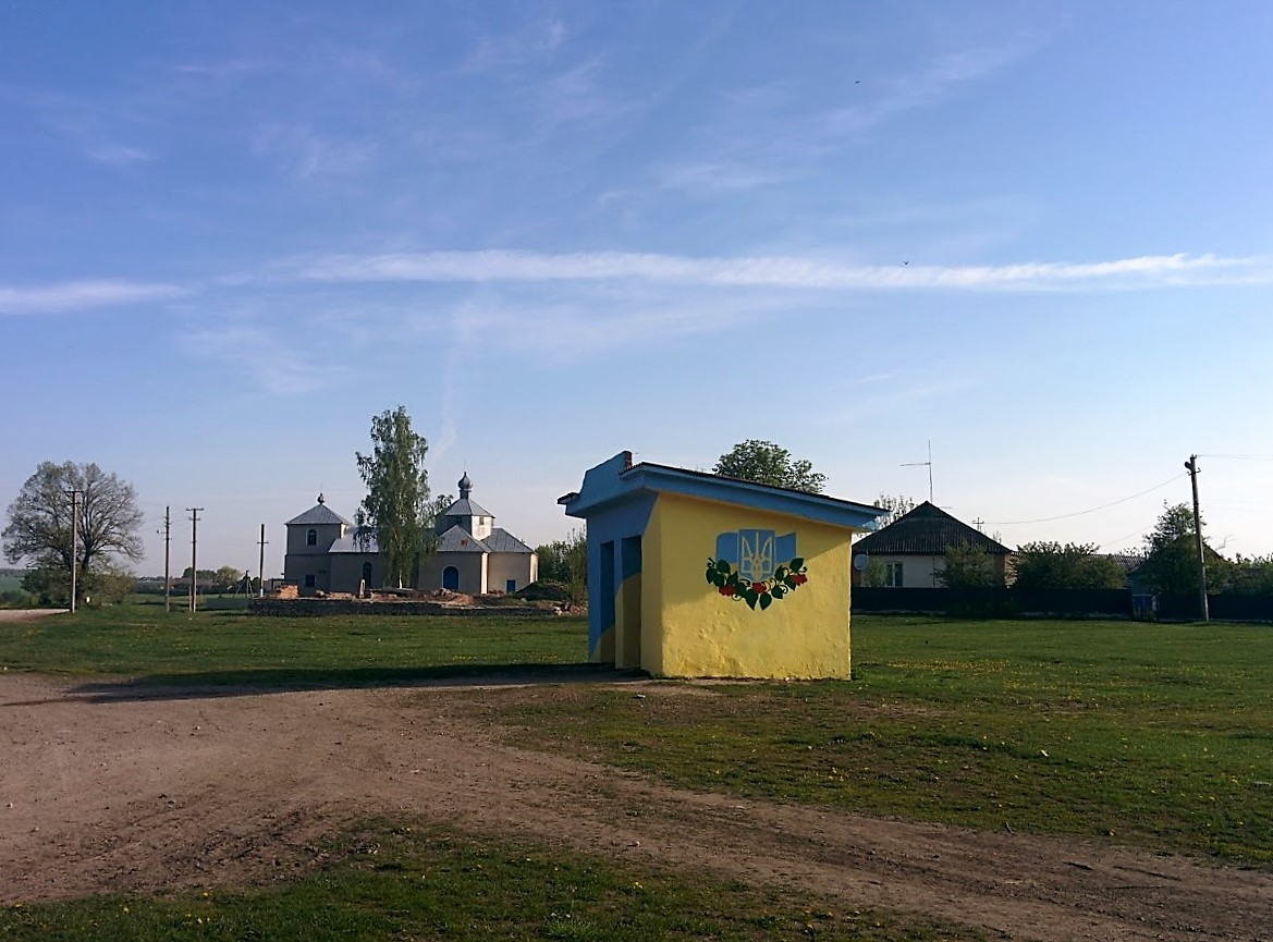 На фото видно автобусну зупинку, на задньому плані - православна церква, перед котрою видно фундамент недавно розібраного "довгобуду"